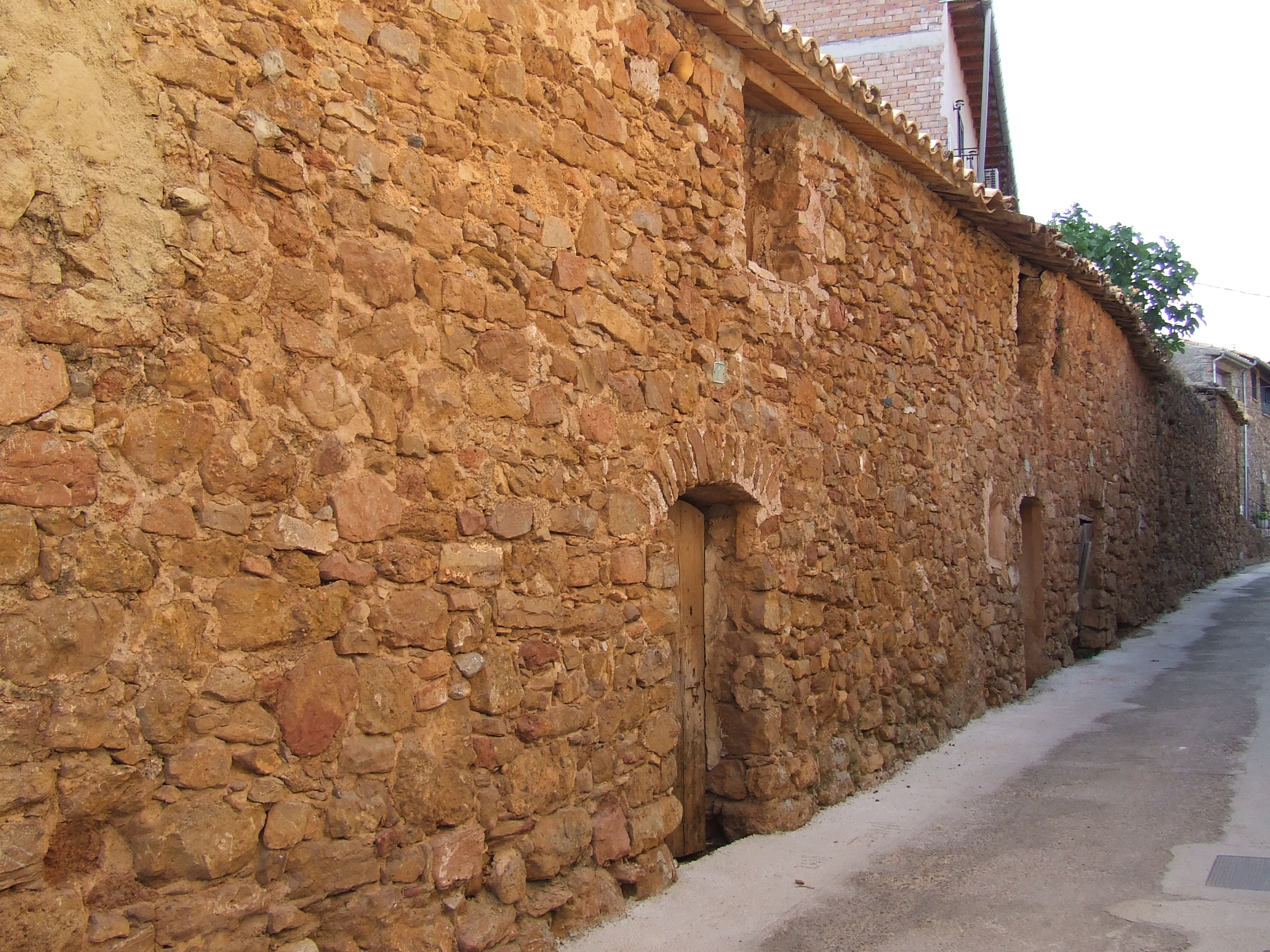 Cases velles del raval del carrer de la Serra (Talarn, Pallars Jussà)